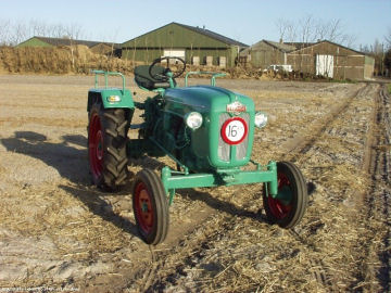 Kramer KL200 van Cor Scholten